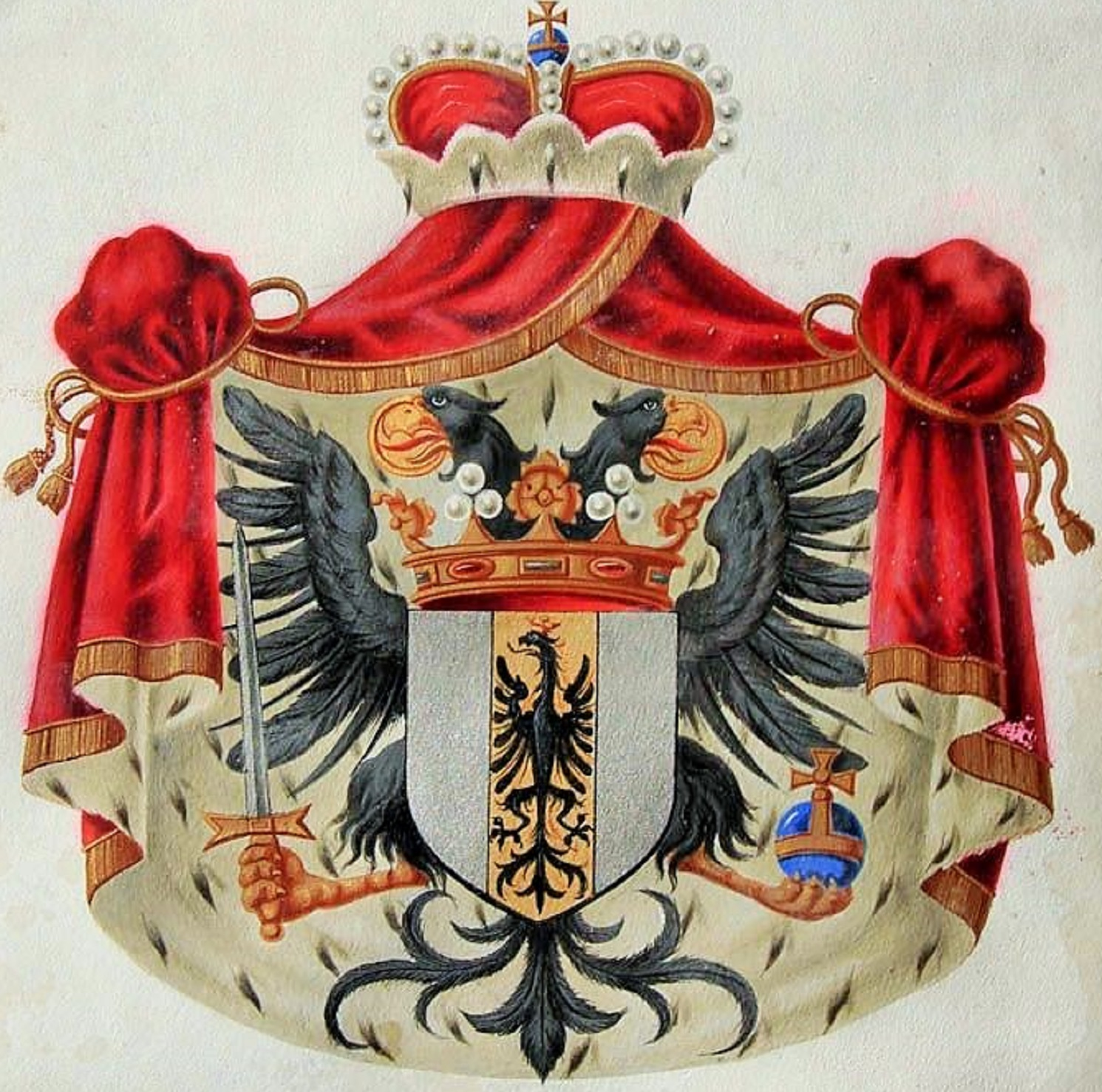 Stemma gentilizio della famiglia Imperiale [1]